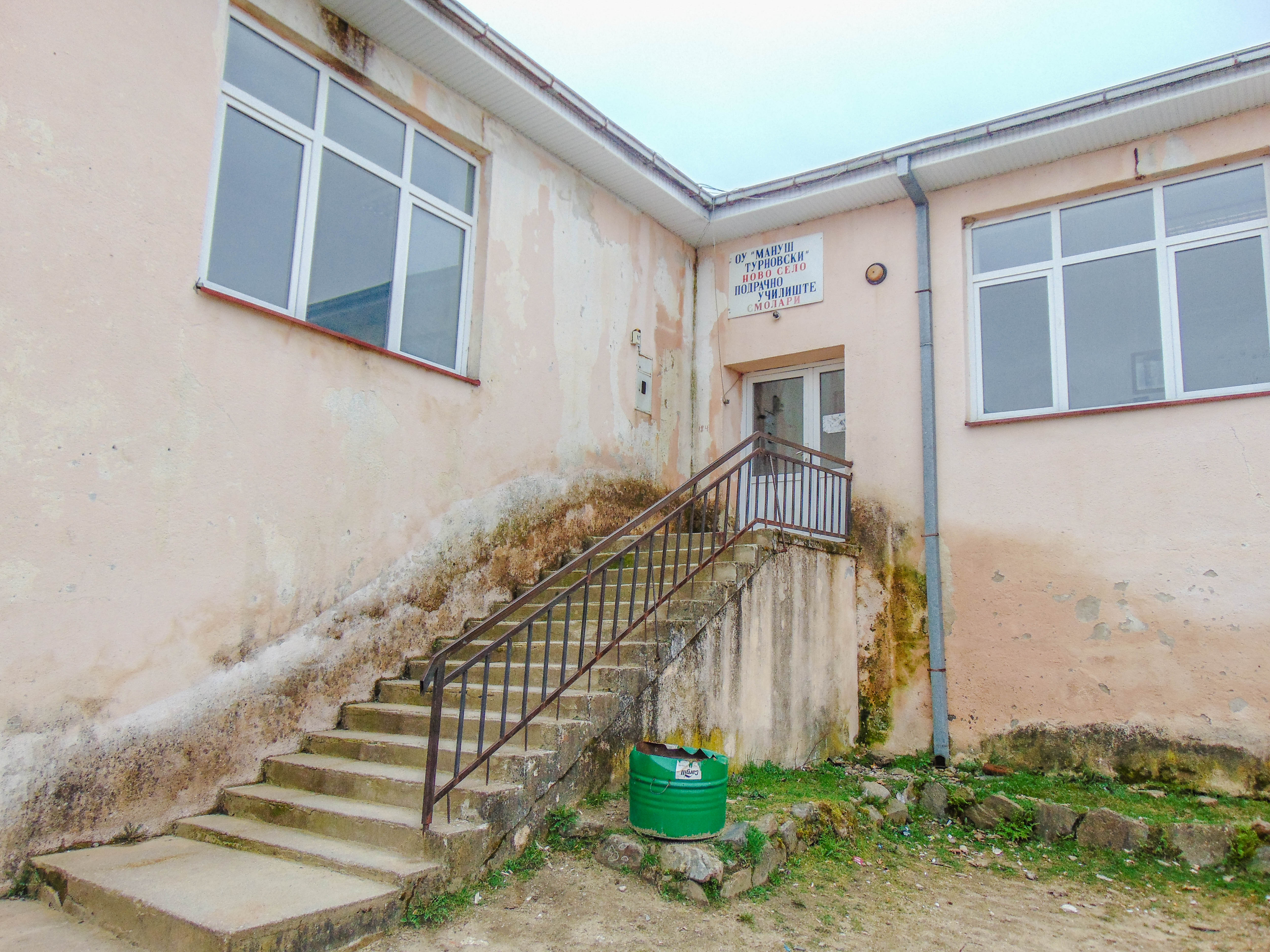 ОУ „Мануш Турновски“ - Смолари